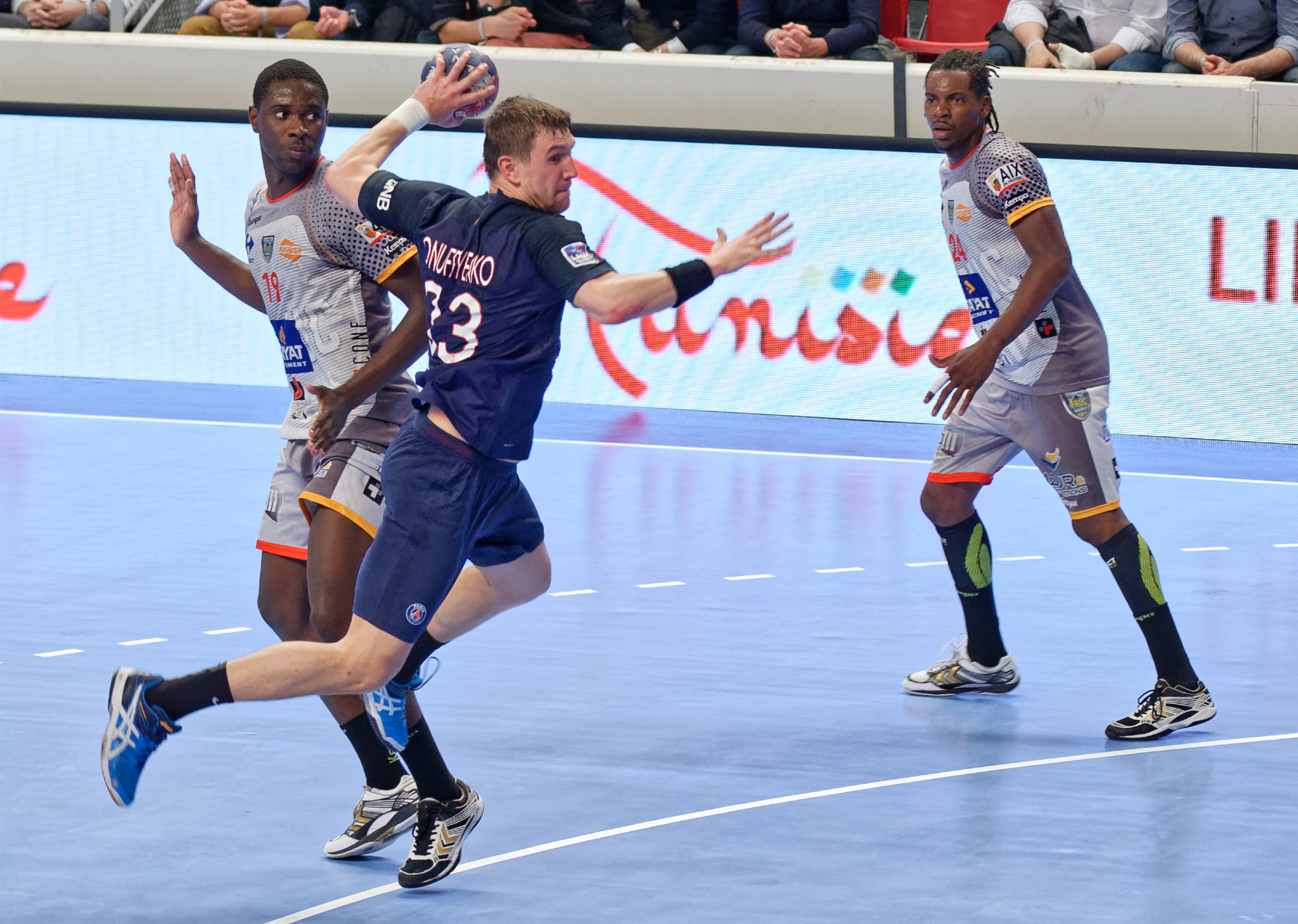 Rencontre de championnat entre le PSG et Pays d'Aix handball. A Coubertin, le 2 juin 2016.